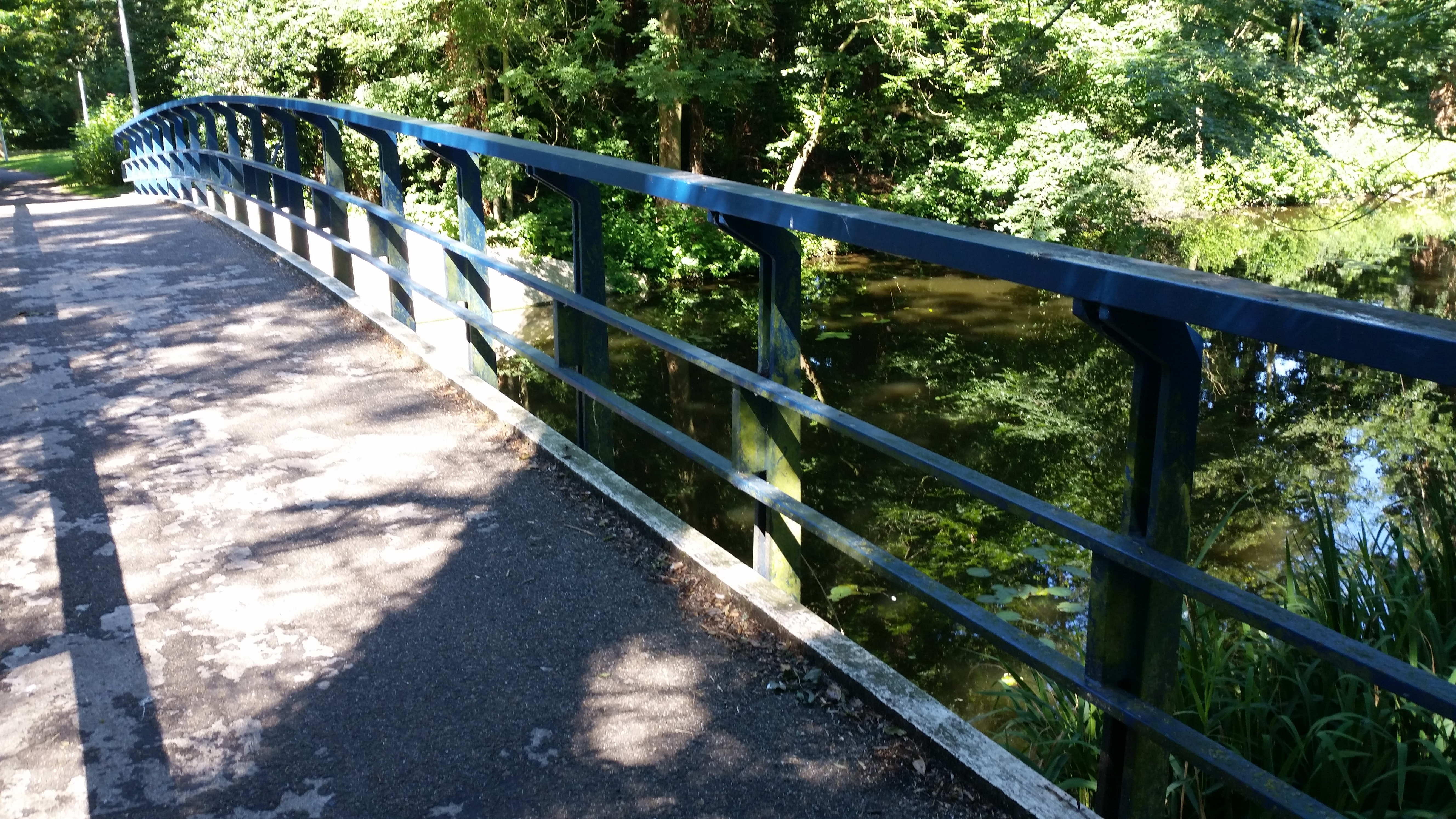 Brug 721, overzicht van de leuning